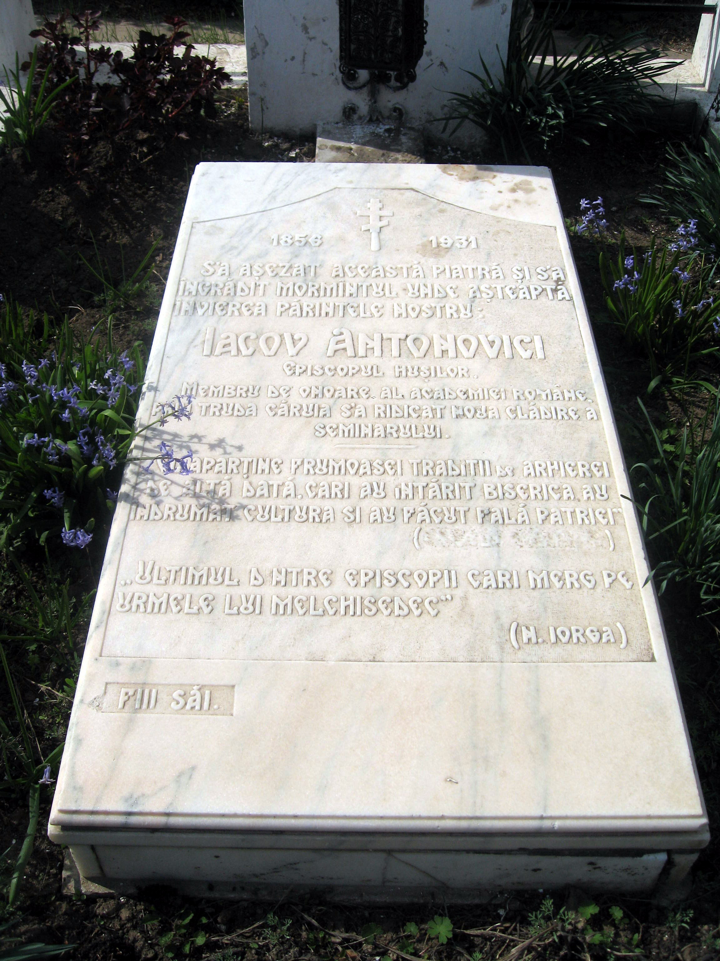 Catedrala episcopală din Huși - mormântul episcopului Iacov Antonovici